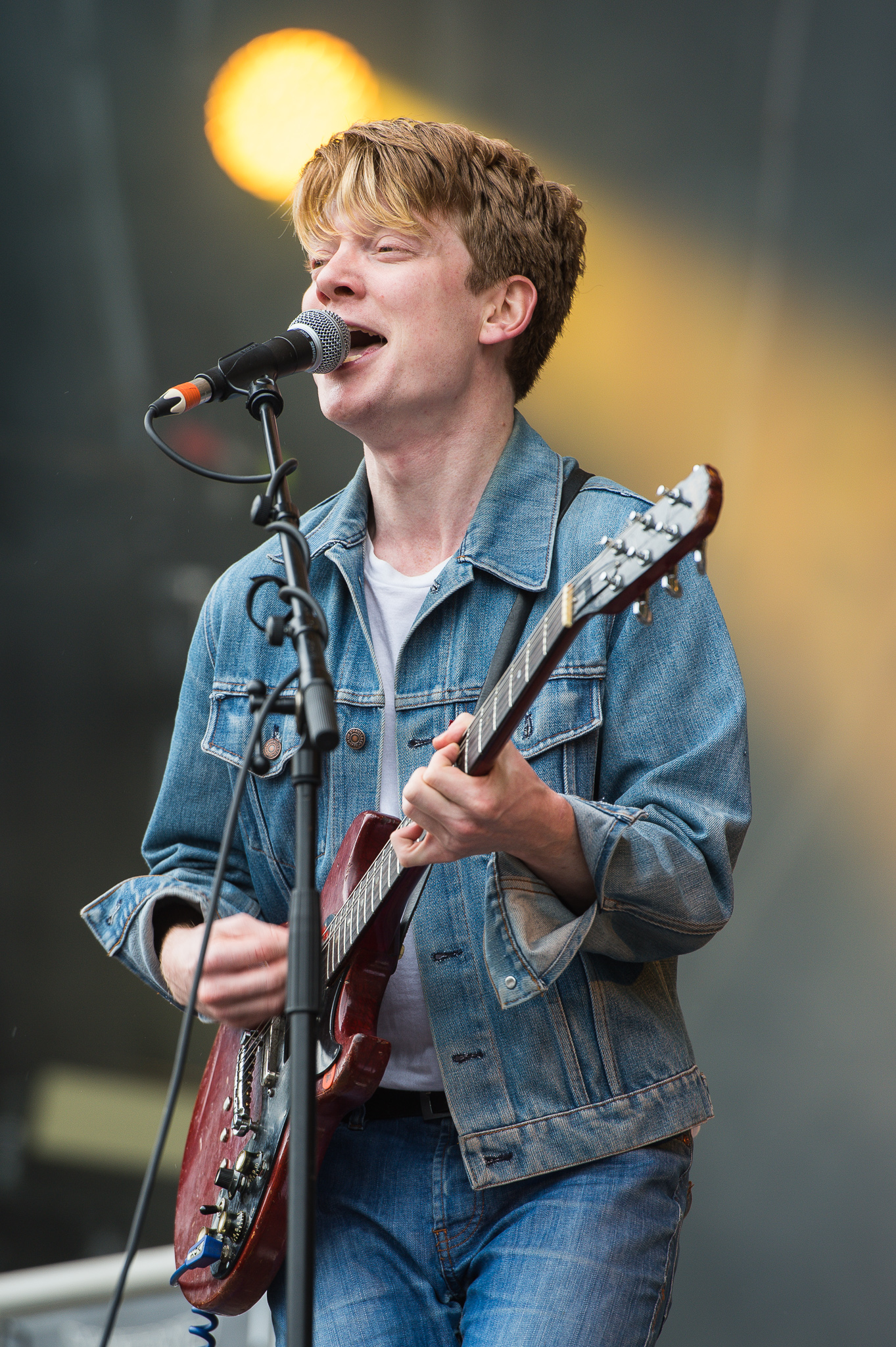 ARGO-Konzerte,Beck's Park Stage,Festival,Konzert,Livekonzert,Livemusik,Musik,Paul Pötsch,RiP,Rock im Park 2016,Trümmer